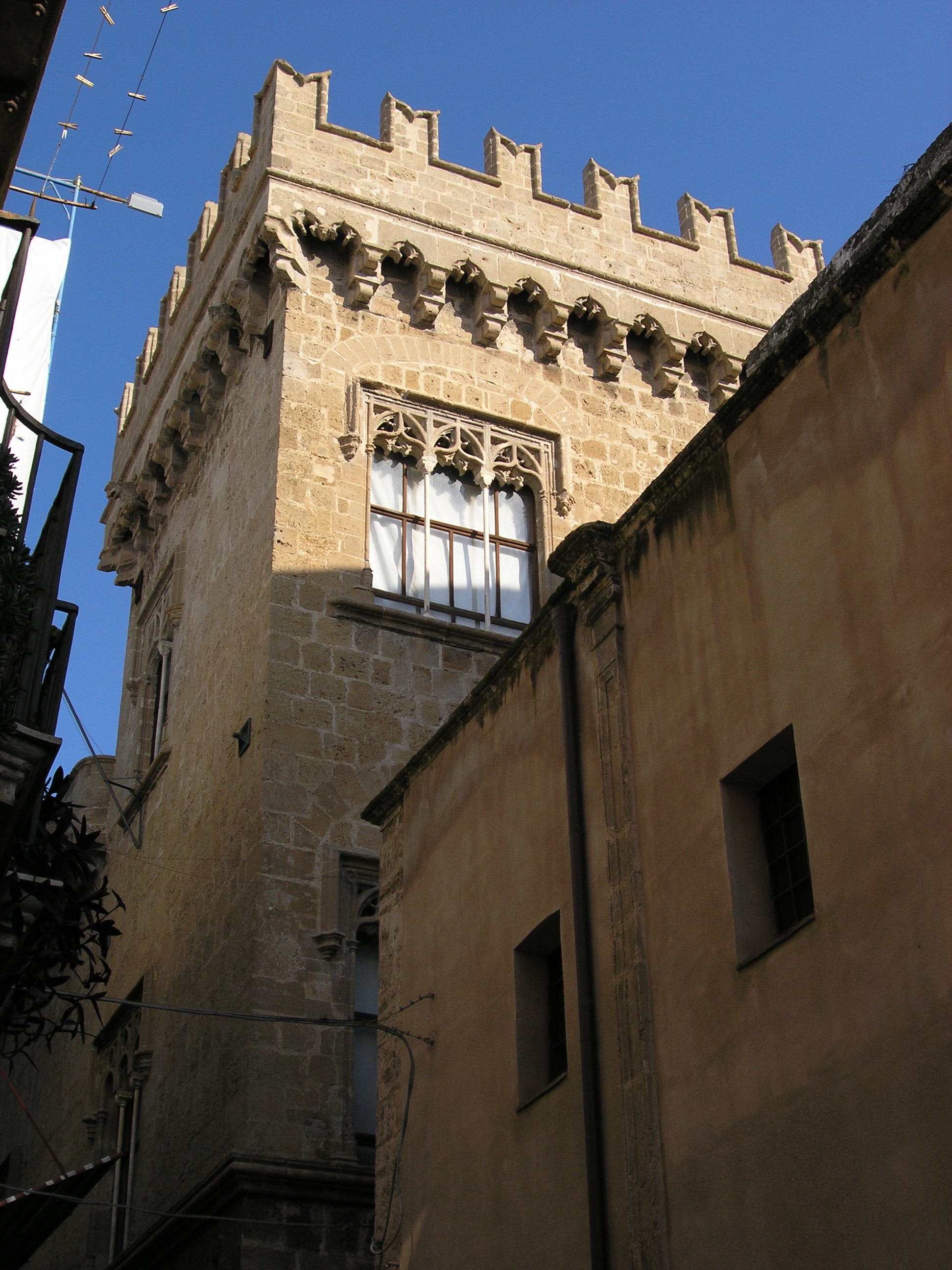 Sicilianu: Palazzu Abatellis - turri